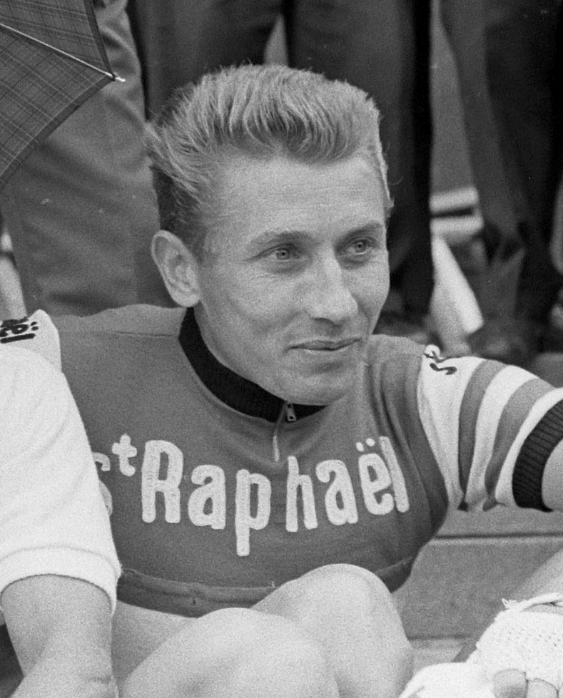 Nationaal Archief Beschrijving: Voor de start. Jacques Anquetil Datum 27 juni 1963 Bestanddeelnummer 915-3084 Vervaardiger: Anefo / Harry Pot (1929–1996) DescriptionDutch photographer and cinematographerDate of birth/death 1929 1996Work location Amsterdam, BentveldAuthority control : Q27877051 VIAF: 284191334 ISNI: 0000 0003 9050 874X Koninklijke: 073478326 creator QS:P170,Q27877051 URL: Voor meer informatie over het Nationaal Archief: Voor meer foto's uit deze en andere collecties, bezoek onze Beeldbank:, U kunt ons helpen onze kennis van de fotocollecties te verrijken door tags en commentaren toe te voegen. Herkent u mensen of locaties of heeft u een bijzonder verhaal te vertellen bij één van de foto's, laat dan een reactie achter (als u ingelogd bent bij Flickr) of stuur een mailtje naar